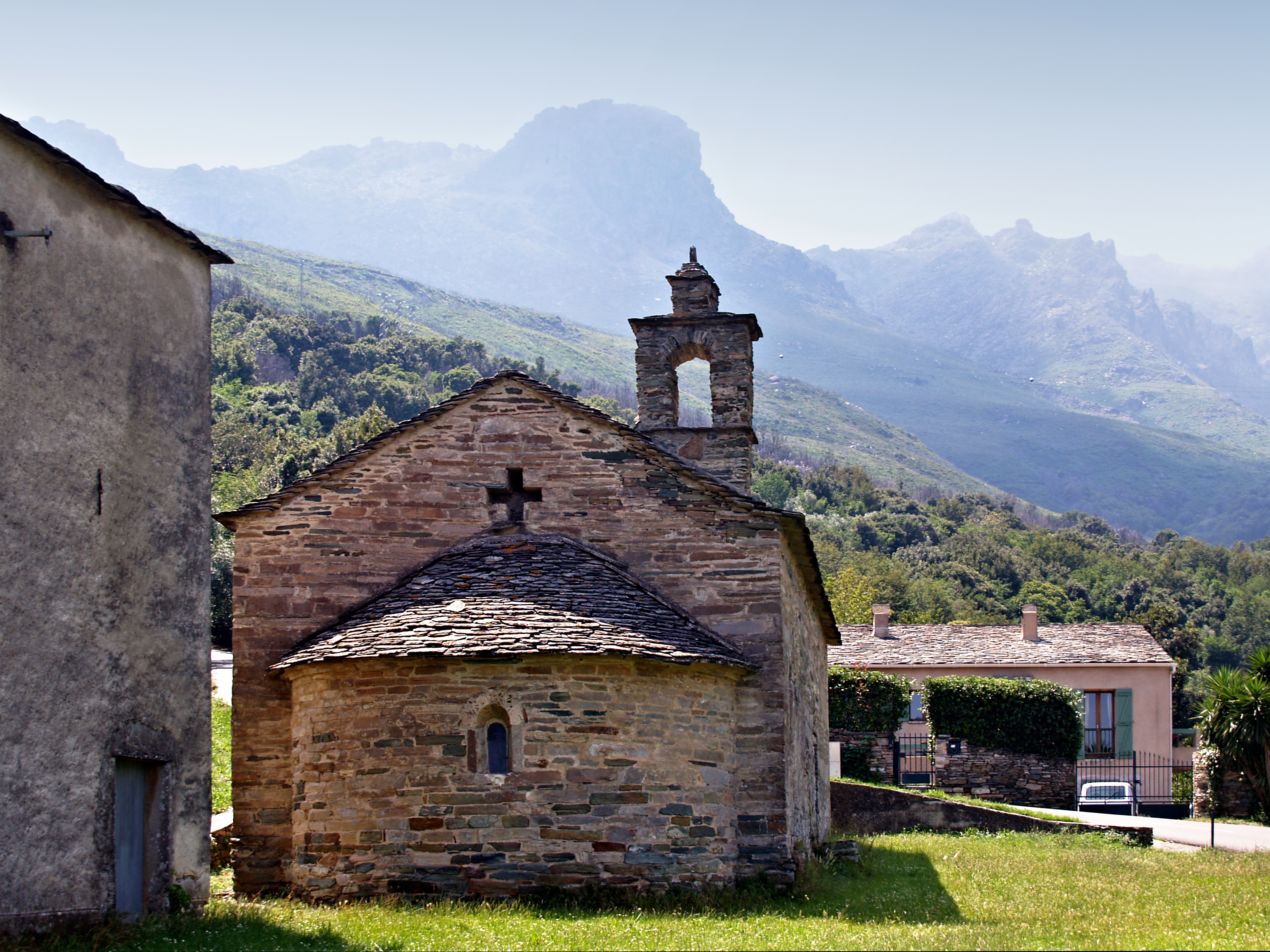 Corsu: Brandu, Cap Corse (Corsica) - Abside di a cappella Santa Maria delle Nevi di Parocchja - Castello